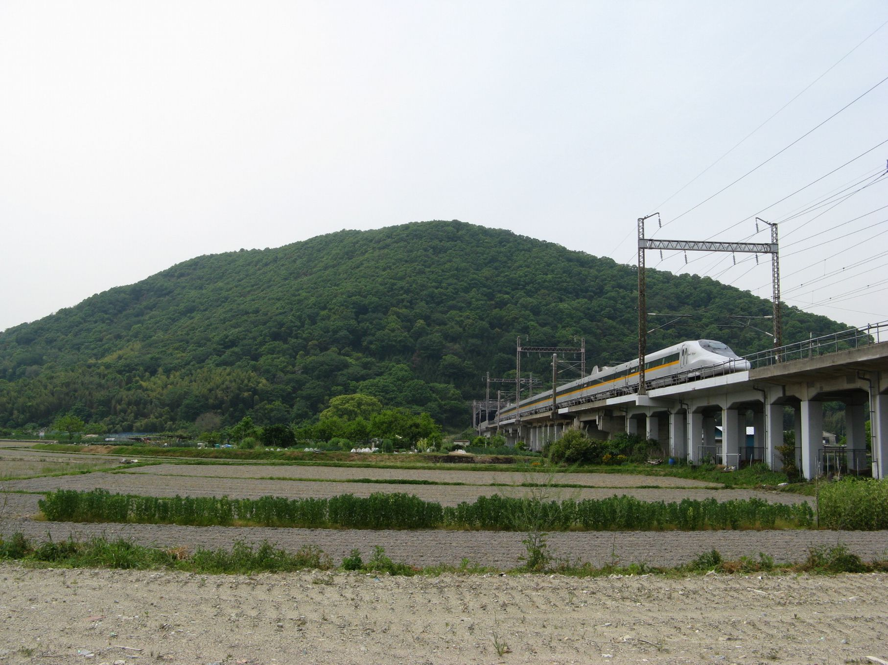 檀特山 太子町太田南部から西望 「ひかり463号」が檀特トンネルに入る